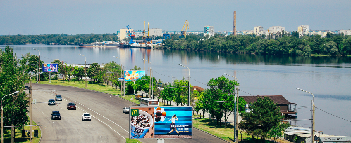 вид на набережну в районі Амурського мосту